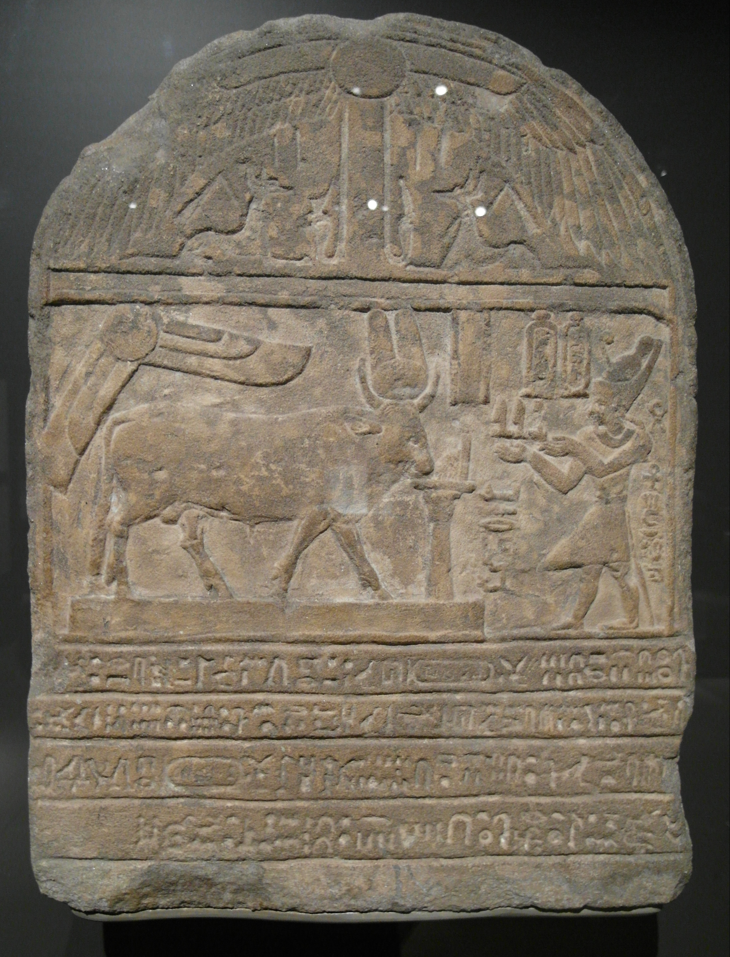 Estela de arenisca que muestra al faraón Ptolomeo II haciendo una ofrenda al toro Bujis, encarnación del dios de la guerra Montu. Dinastía ptolemaica, reinado de Ptolomeo II (hacia 264-246 a. C.). Armant. EA 1694.